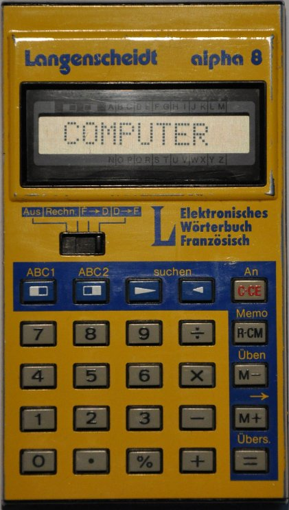 Langenscheidt alpha8 - Elektronisches Wörterbuch Französisch selbst fotografiert